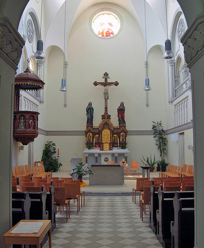 Erlöserkirche Liesing, Wien